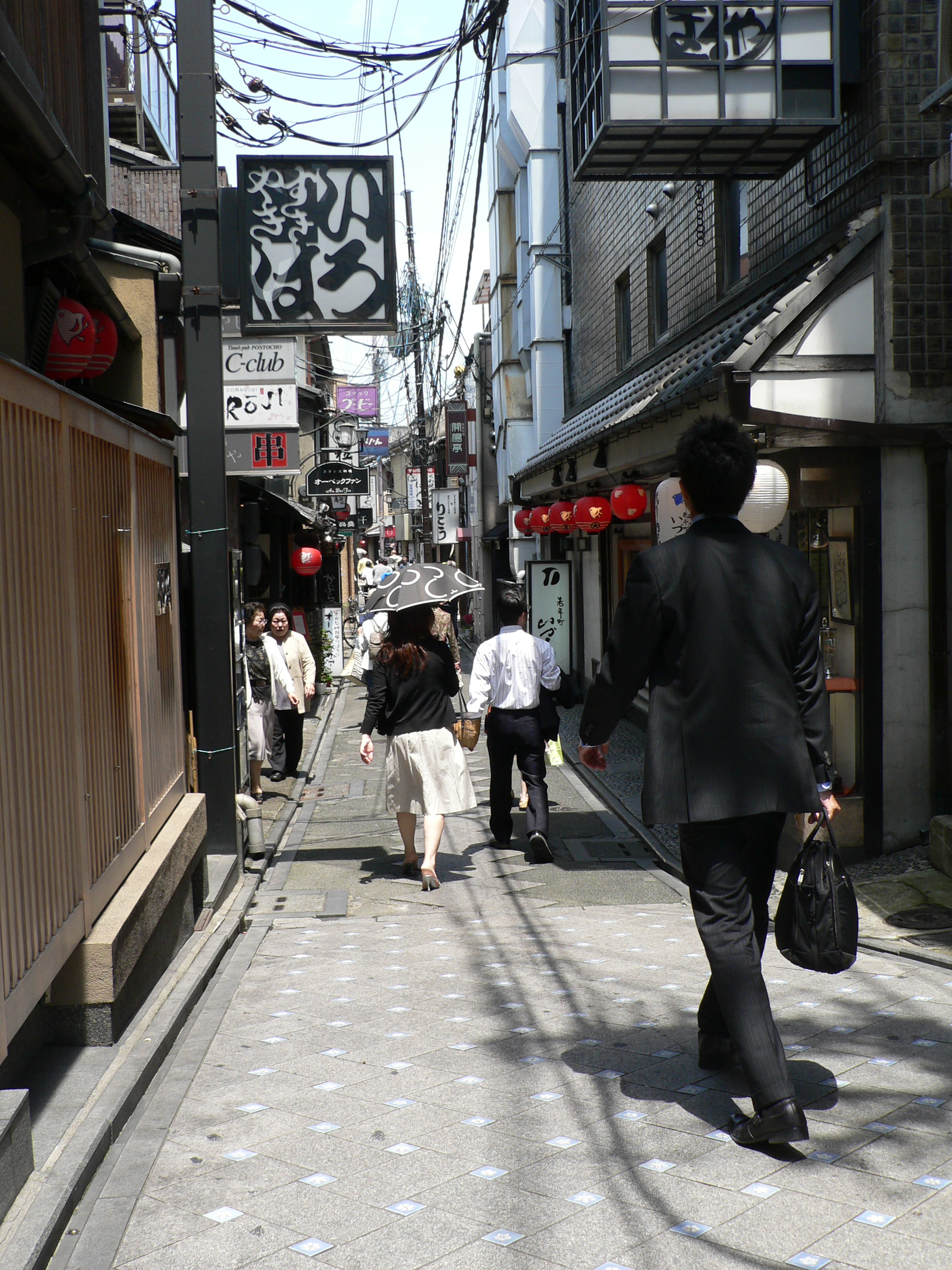 Sukiyaki restaurant (left) and Unagi restaurant (right)